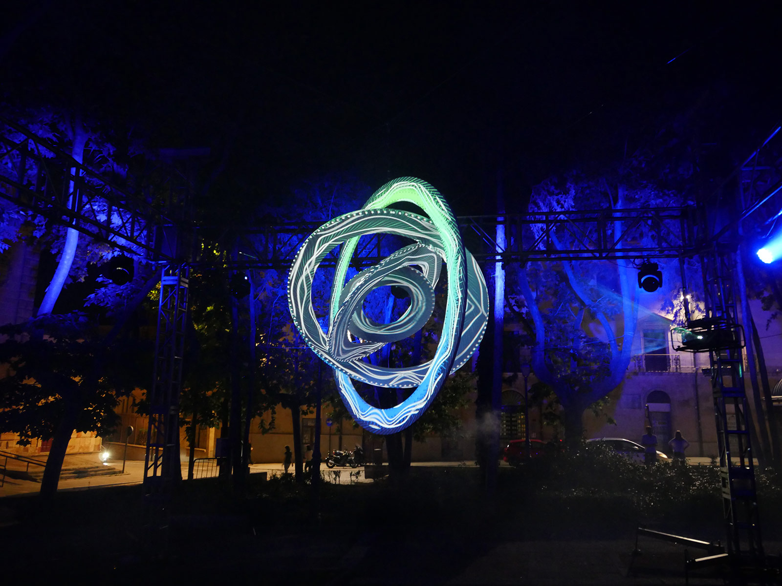 VideoInstalación de la obra "pi"